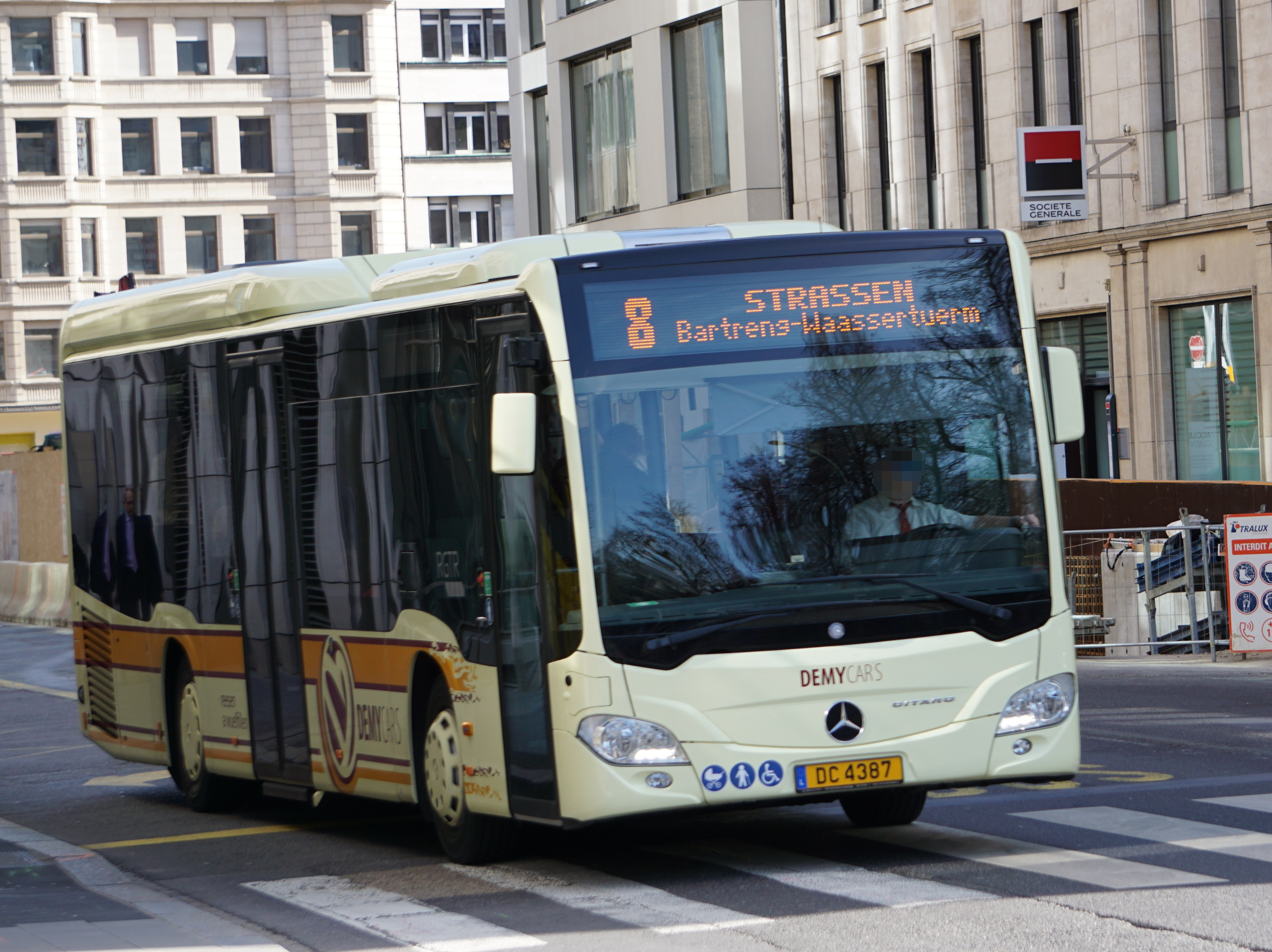 Bus "Demy Cars" am Optrag vum "Département des Transports" op der Linn 8 (#DC 4387) Marque: Mercedes Fiert vum an der Av. Emile Reuter op der Linn 8 a Richtung Stroossen.